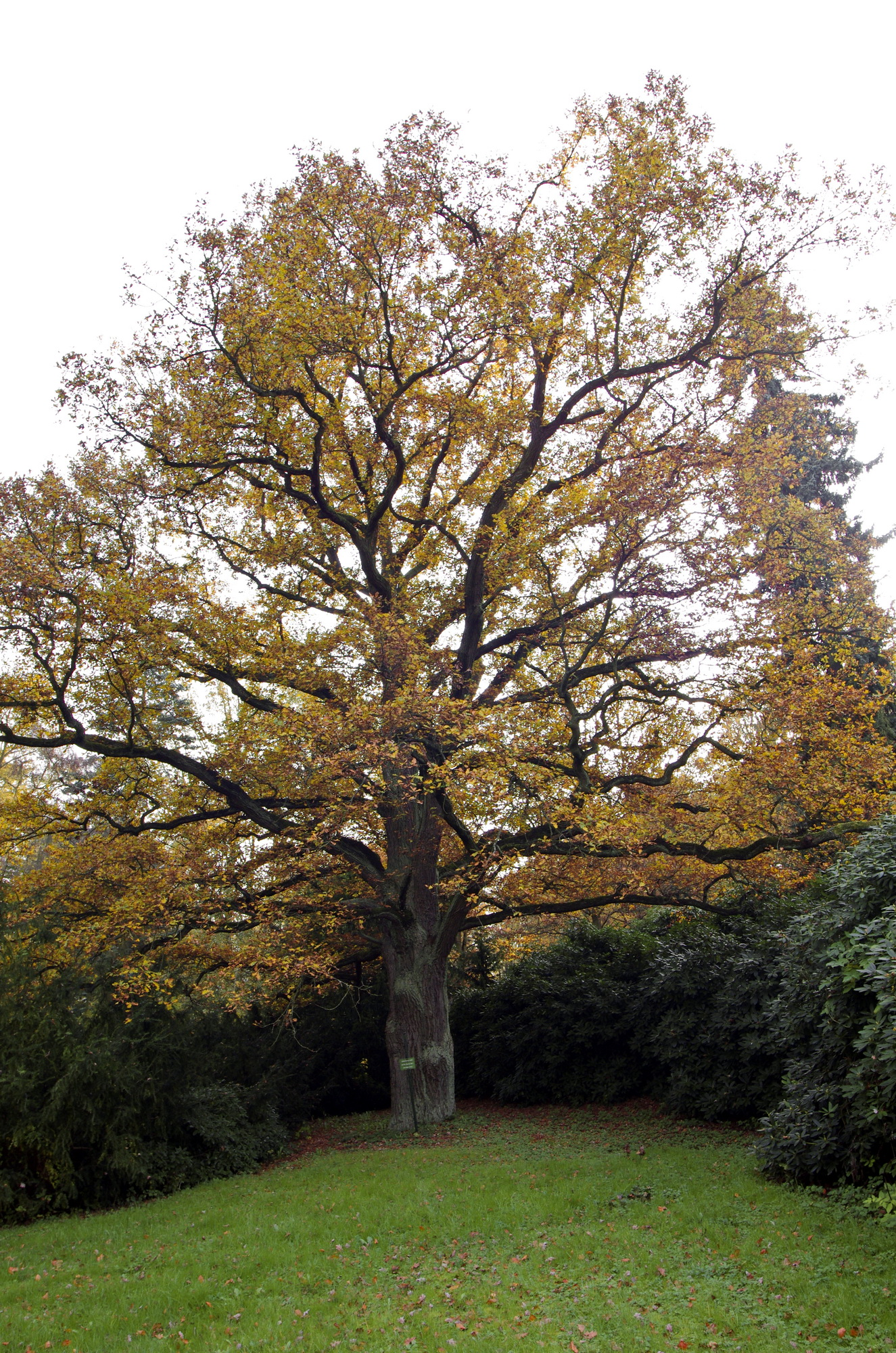 Památný strom Zámecký dub, Dalovice, okres Karlovy Vary